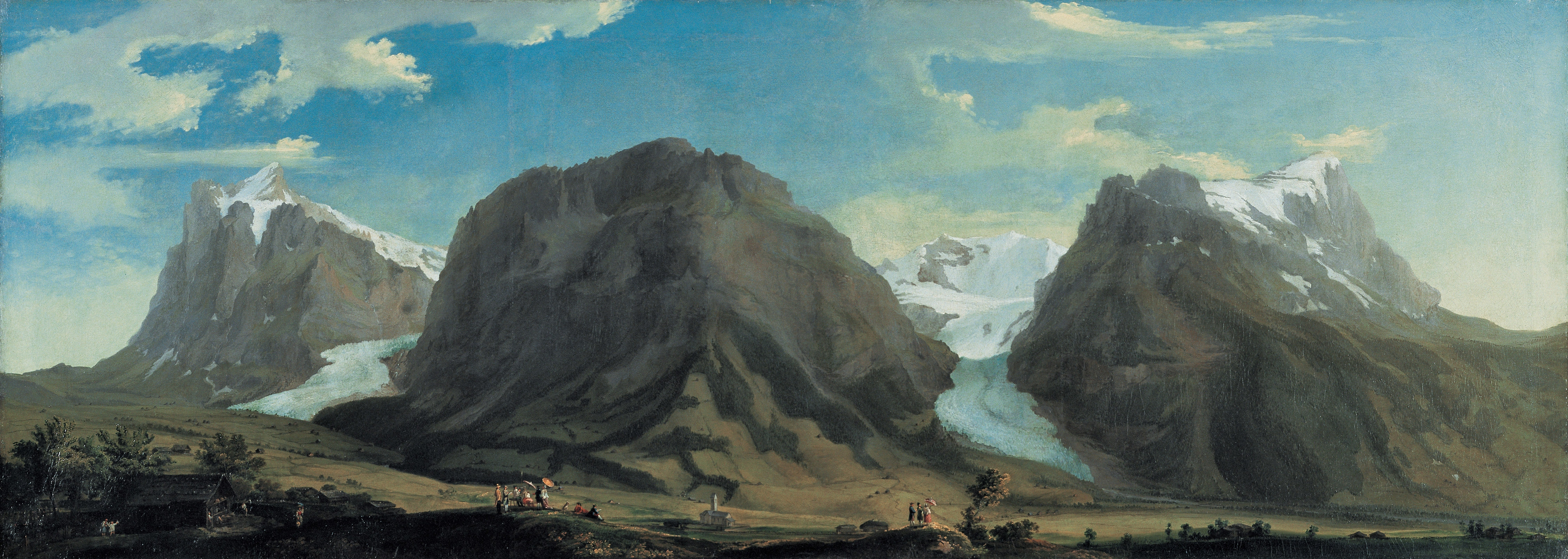 Panorama des Grindelwaldtales mit Wetterhorn, Mettenberg und Eiger